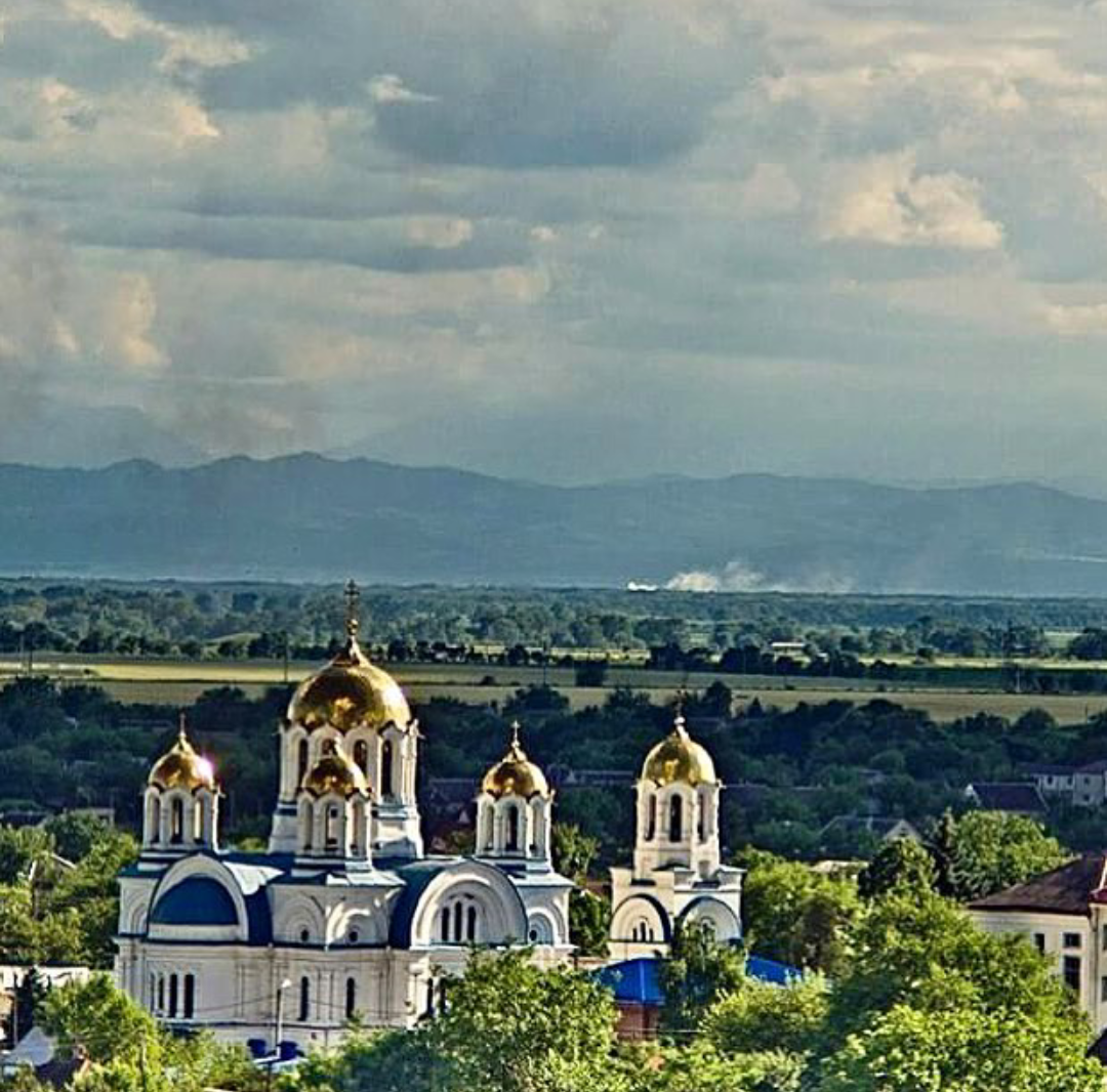 Православный храм в городе Прохладный